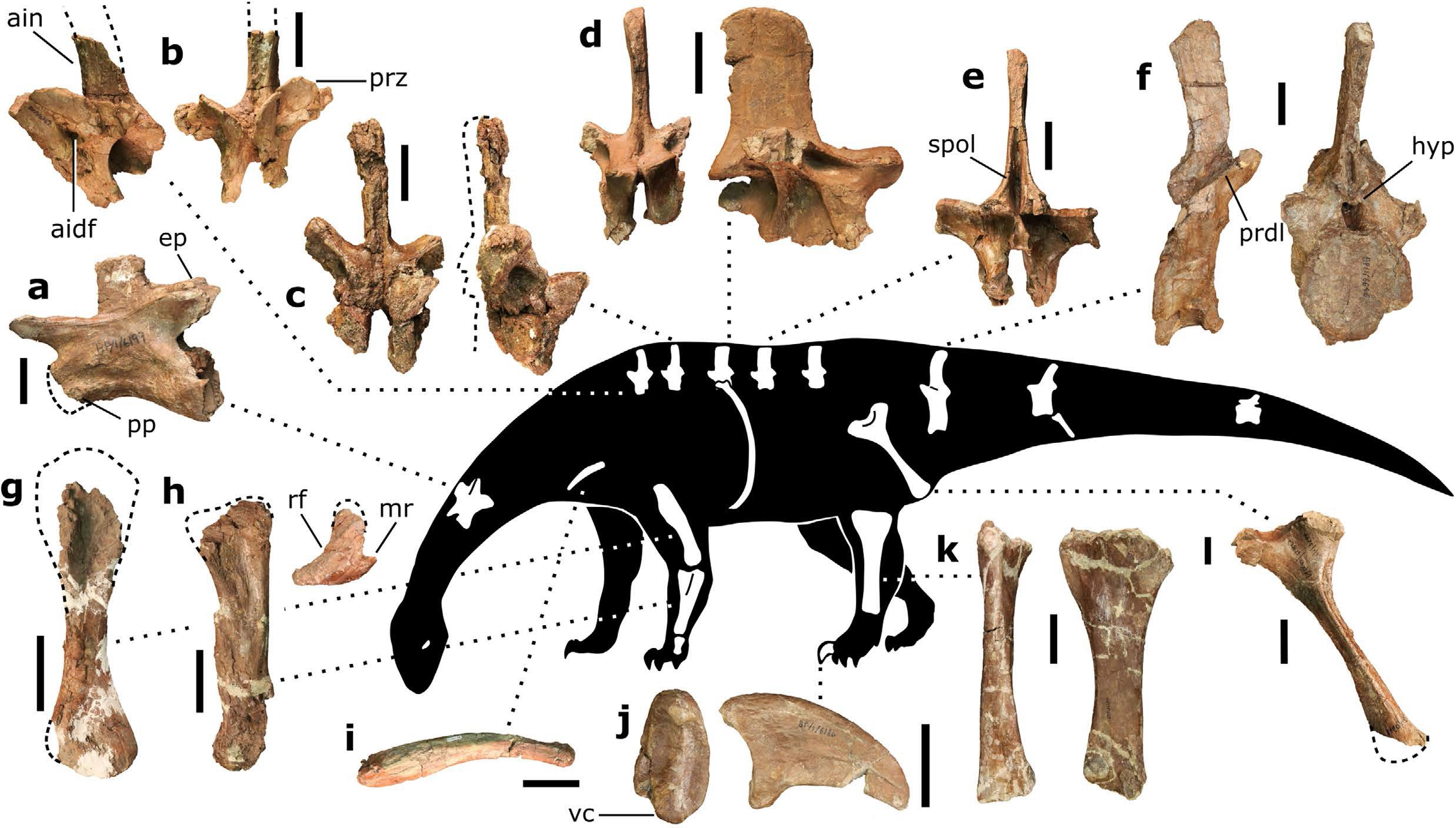 Representative bones of Pulanesaura eocollum. (a) anterior-to-middle cervical vertebrae (BP/1/6199) in left lateral view; (b) holotypic anterior-most dorsal neural arch (BP/1/6882) in left lateral and anterior views; (c) anterior dorsal neural arch (BP/1/6984) in anterior and right lateral views; (d) anterior mid-dorsal neural arch (BP/1/6183) in anterior and right lateral views; (e) middle dorsal neural arch (BP/1/6770) in posterior view; (f) anterior caudal vertebra (BP/1/6646) in right lateral and posterior views; (g) right humerus (BP/1/6193) in anterior view; (h) left ulna (BP/1/6210) in lateral and proximal views; (i) ?left clavicle (BP/1/6752) in dorsal view; (j) left pedal ungual I (BP/1/6186) in proximal and medial views; (k) left tibia (BP/1/6200) in anterior and lateral views; (l) right ischium (reversed) (BP/1/7366) in lateral view. Abbreviations: aidf, anterior infradiapophyseal fossa; ain, anterior incline of the neural spine; ep, epipophysis; hyp, hyposphene; mr, medial ridge; pp, parapophysis; prdl, prezygodiapophyseal lamina; prz, prezygapophyses; rf, radial fossa; spol, spinopostzygapophyseal lamina; vc, ventral convexity. Scale bars equal 5 cm in a-f and i, j; 10 cm in g, h, k, l. Silhouette drawn by BWM Photographs by BWM.